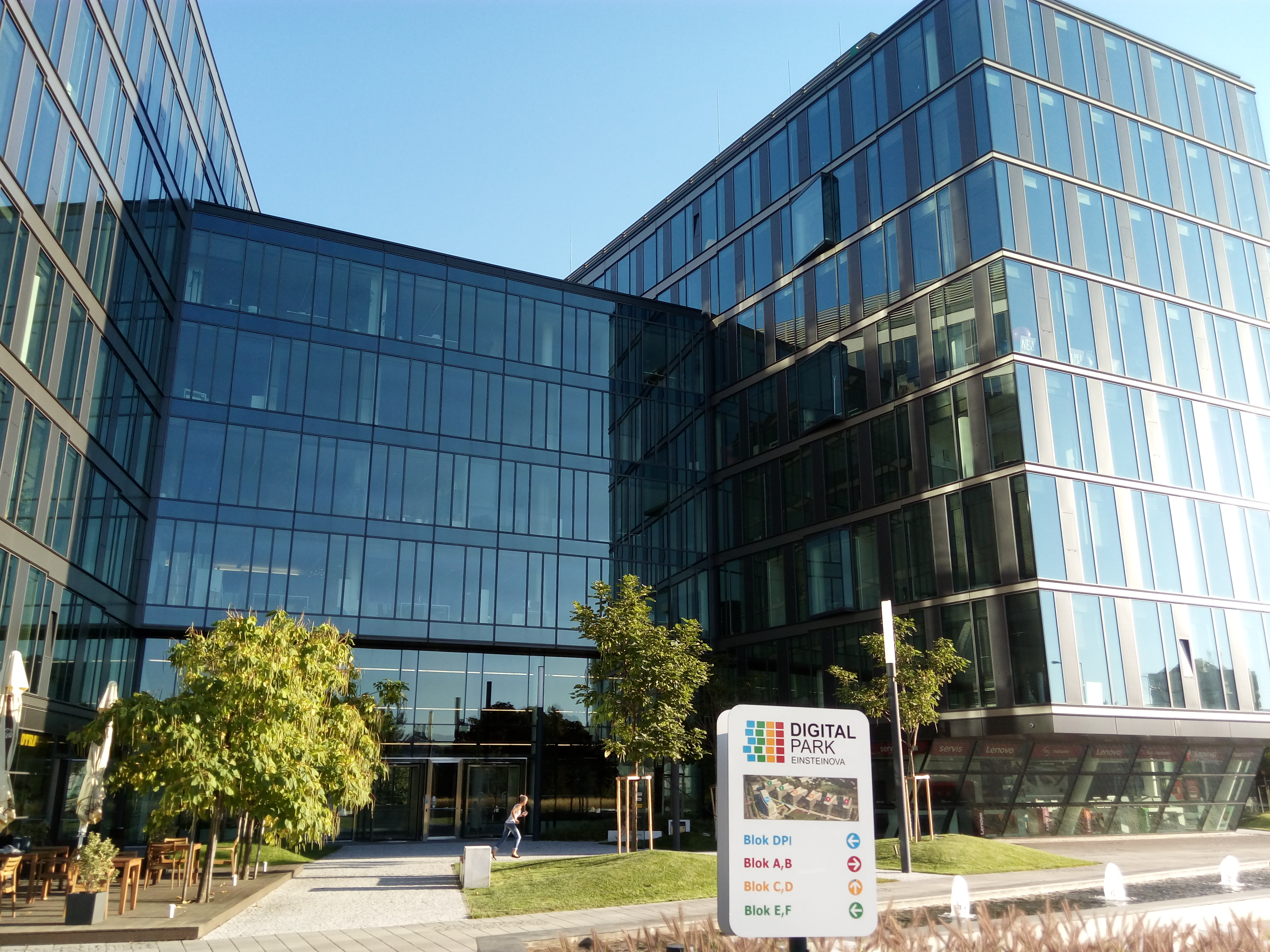 Digital Park, Einsteinova, Petržalka, Bratislava